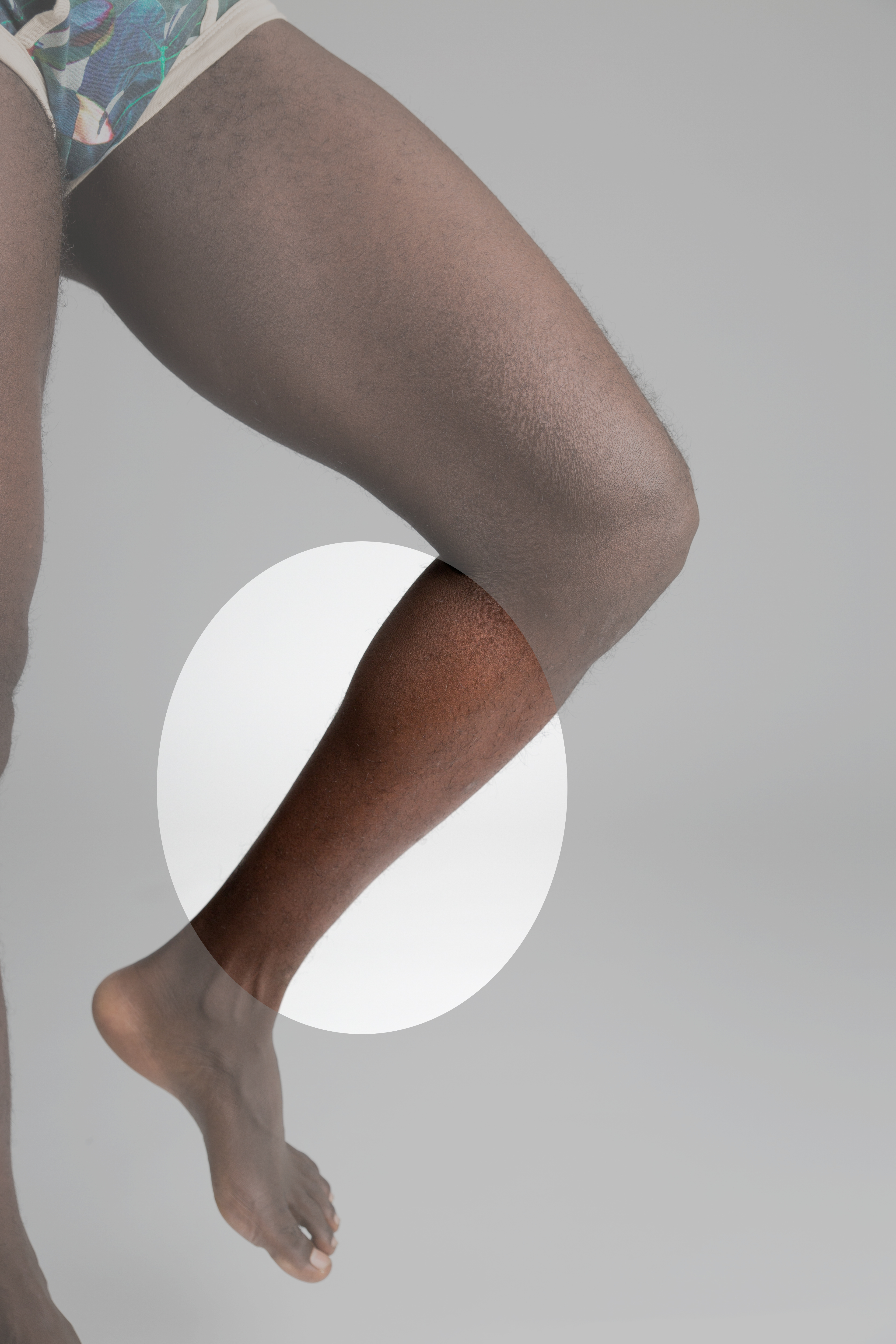 Homa kruro